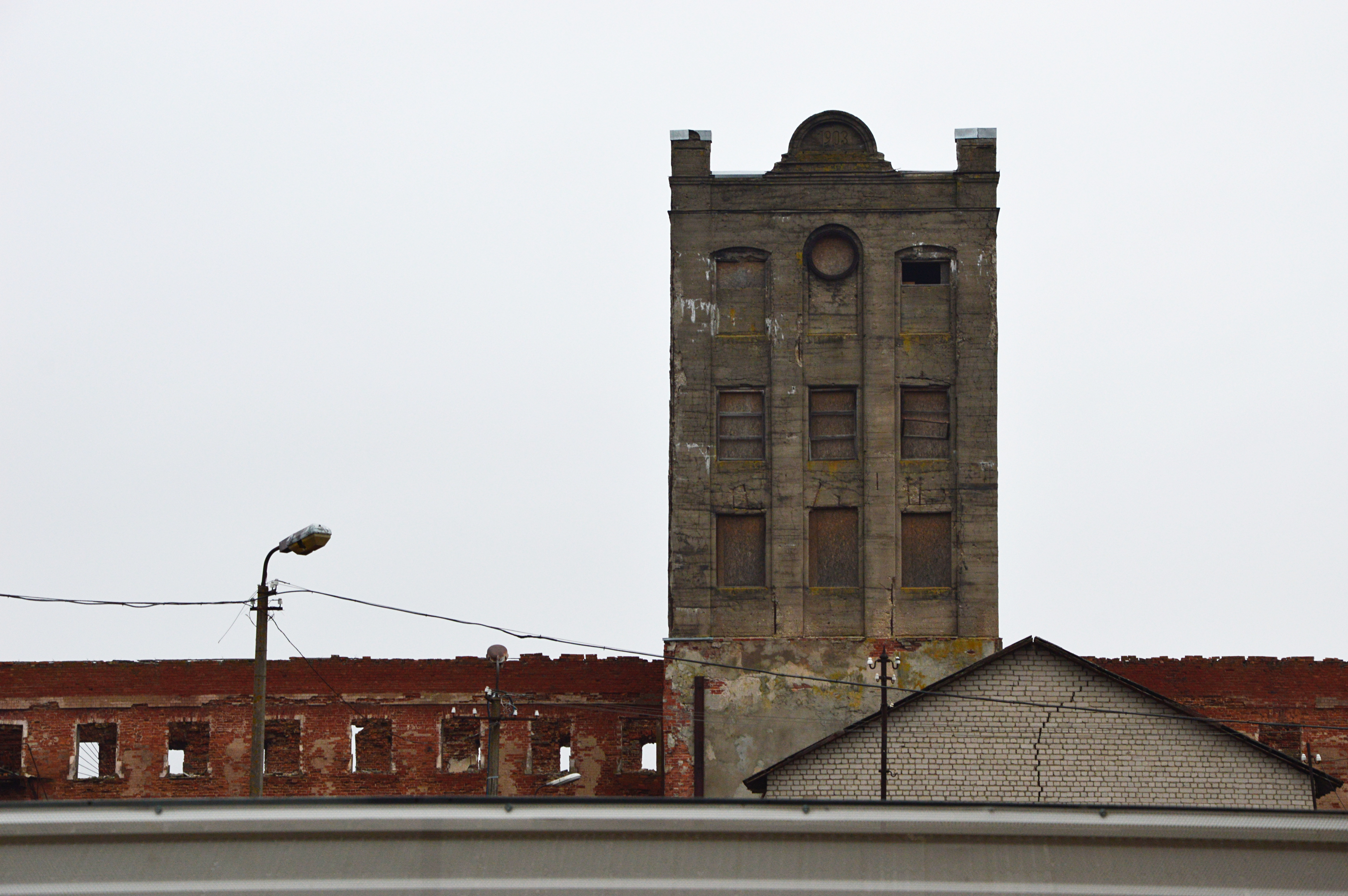 Sindi kalevivabriku hoone torn